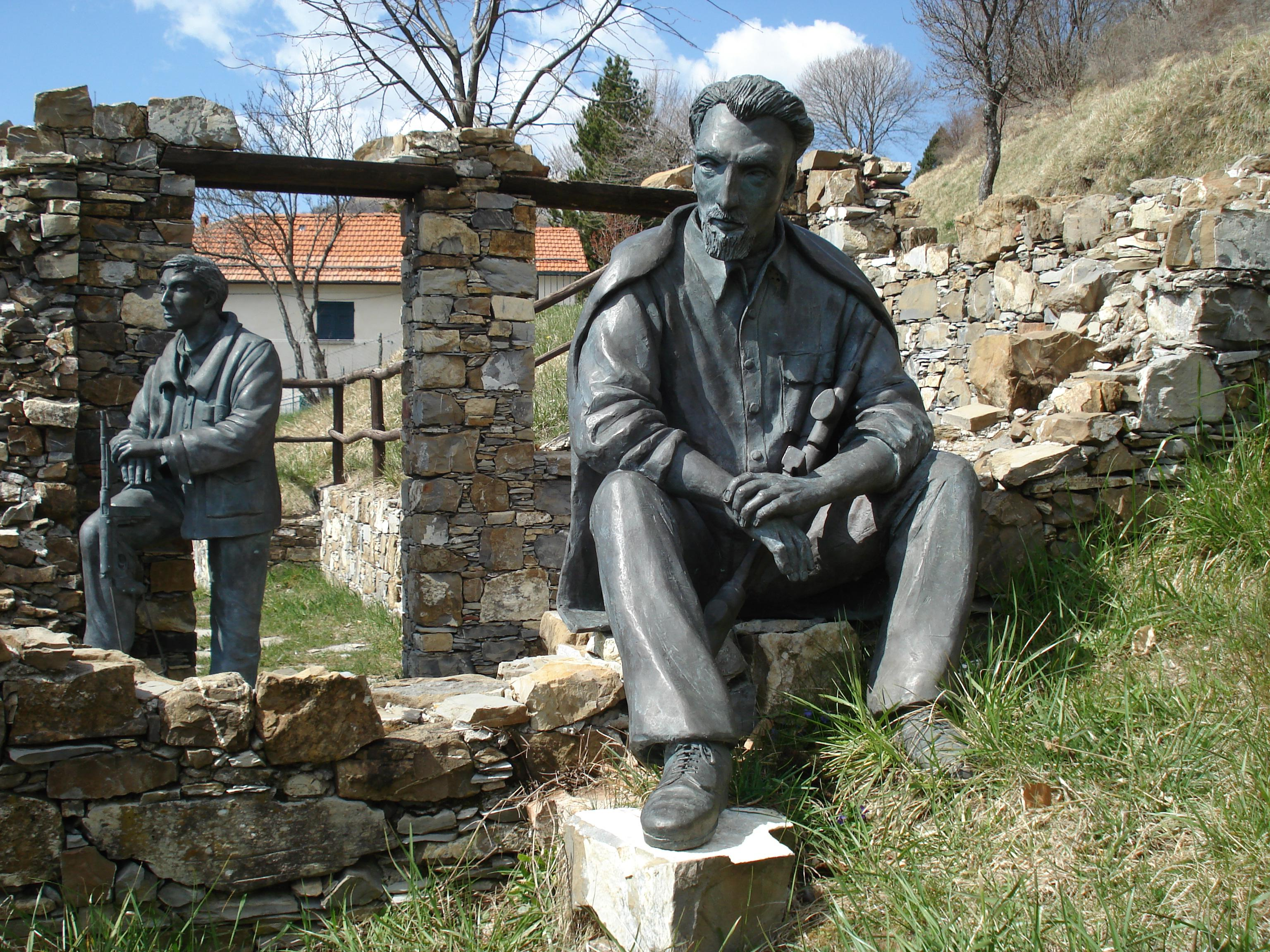 Cosmin latan,05-04-2008,Monumento di Bisagno a Fascia